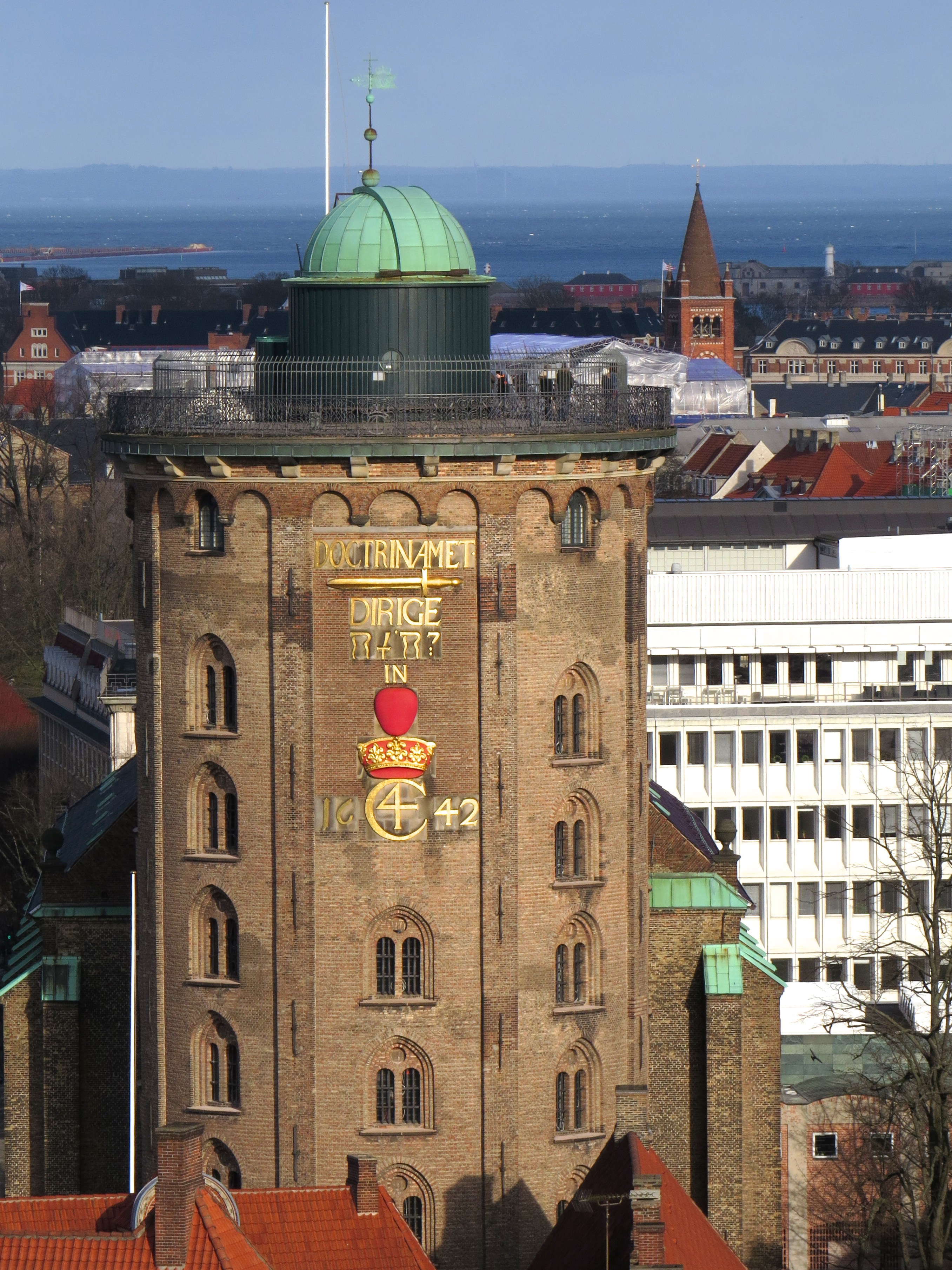 Rundetårn med Christian IVs rebusinskription, København